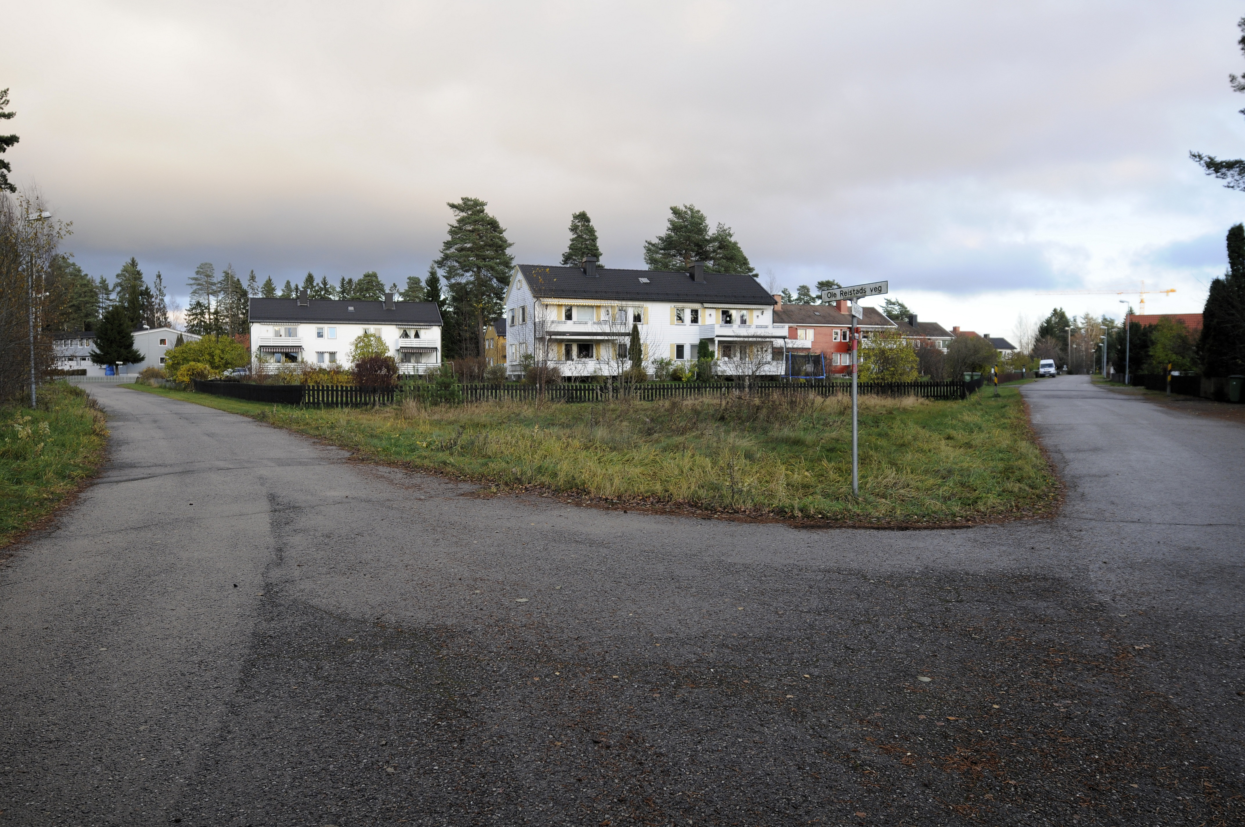 Gjestadhagen på Jessheim